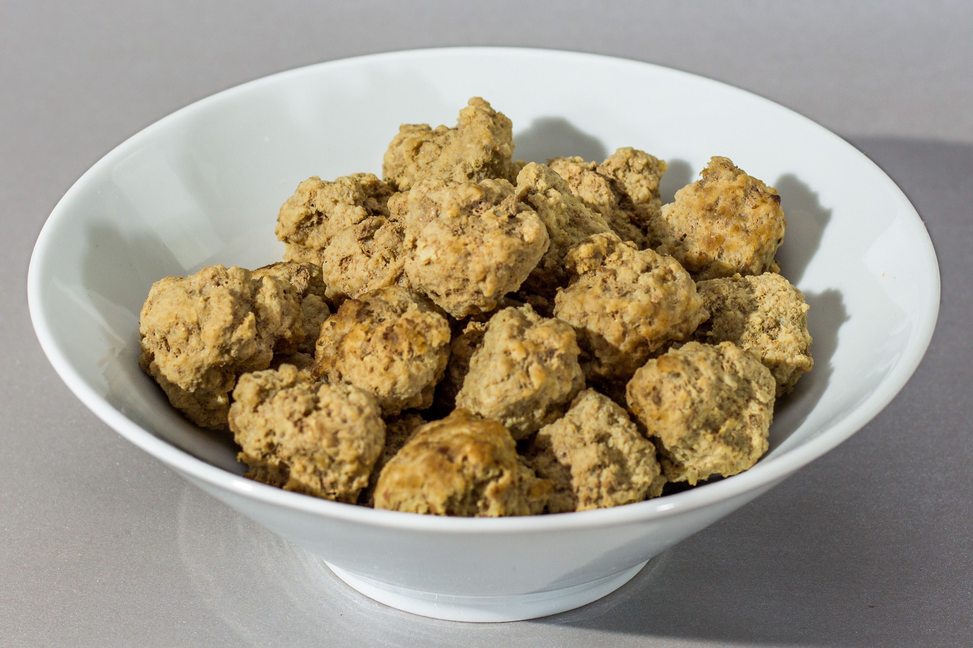 Mini-Frikadellen